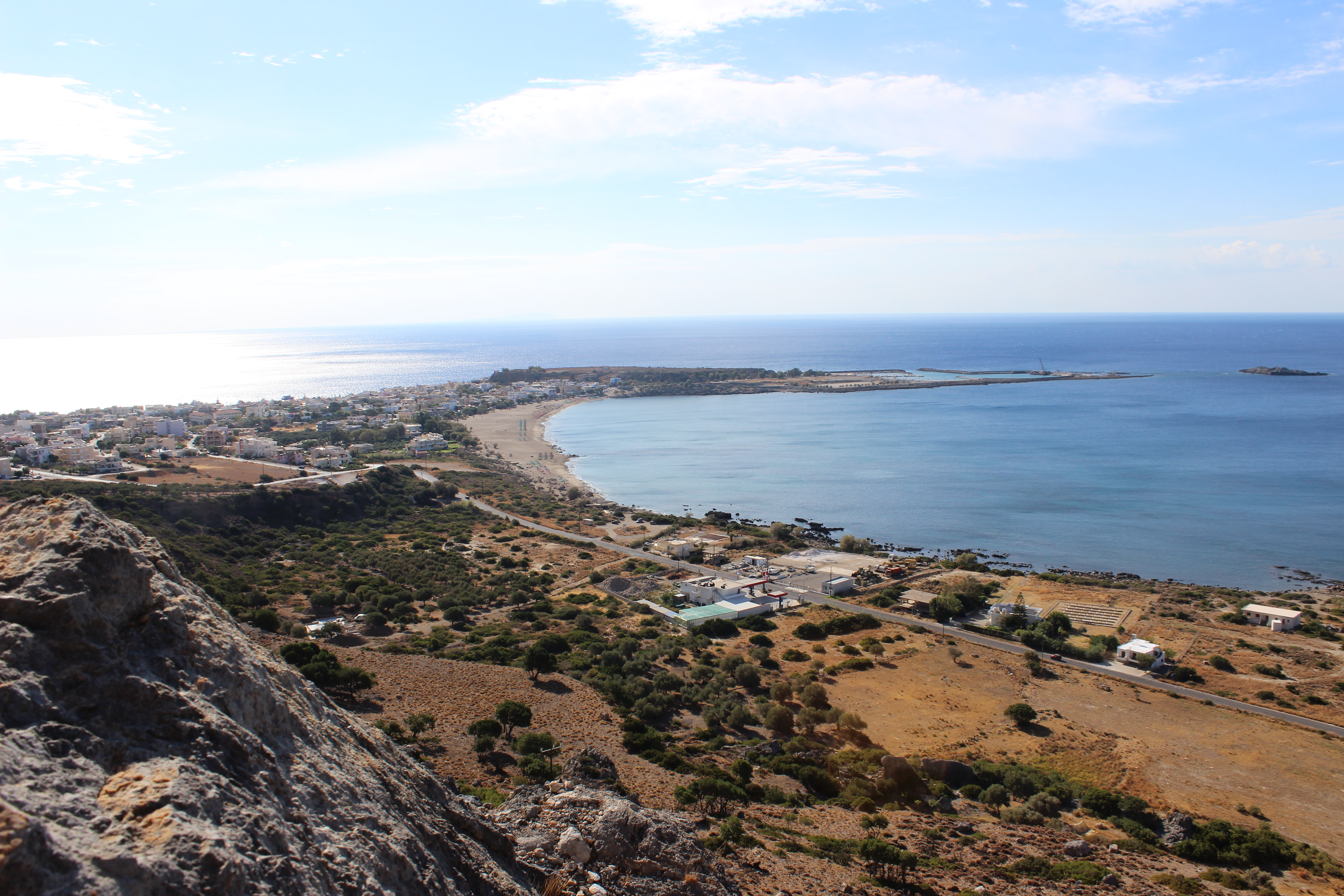 Die Stadt Paleochora